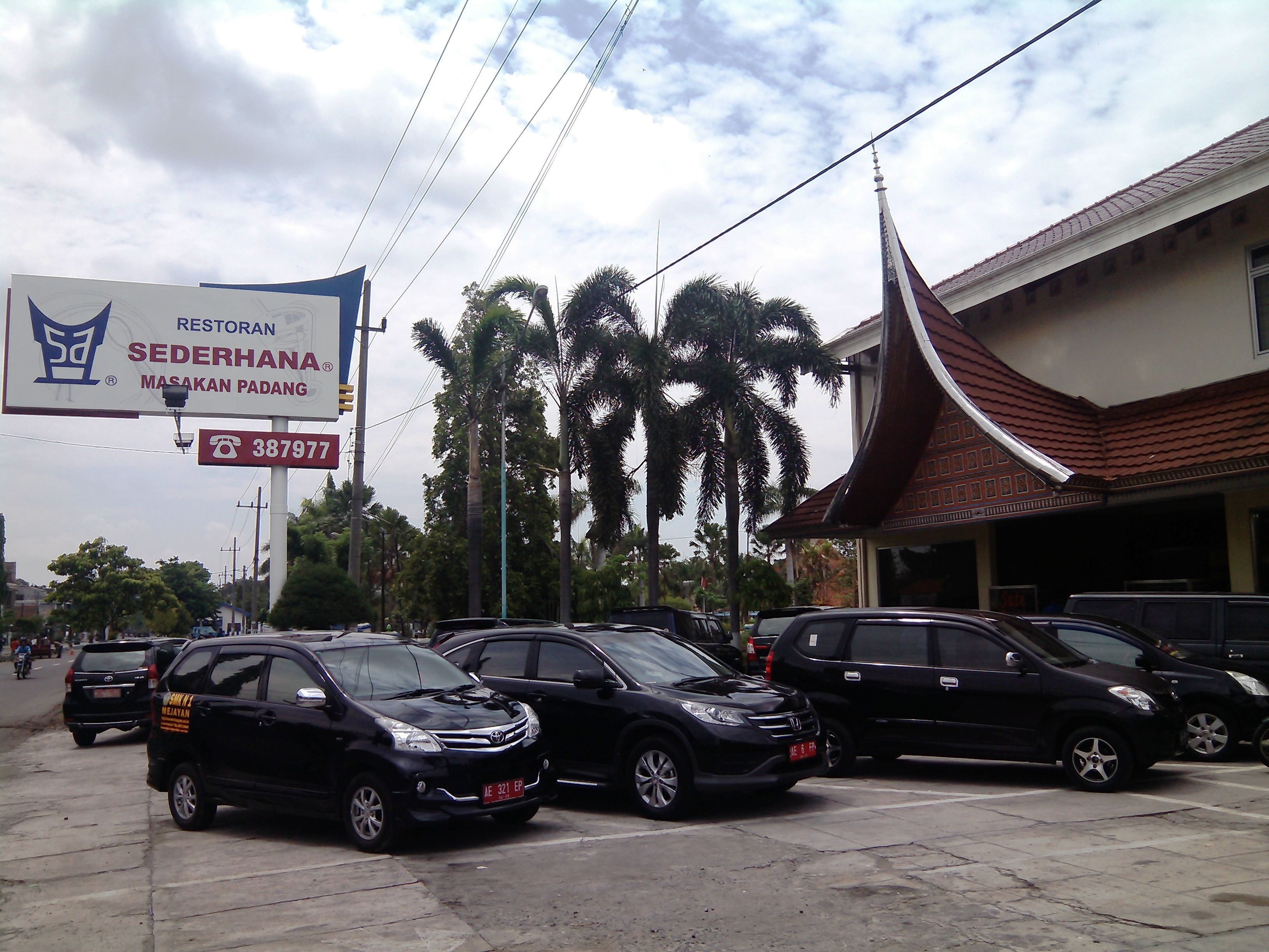 Restoran SEDERHANA masakan padang, di Mejayan, Madiun, Jawa Timur